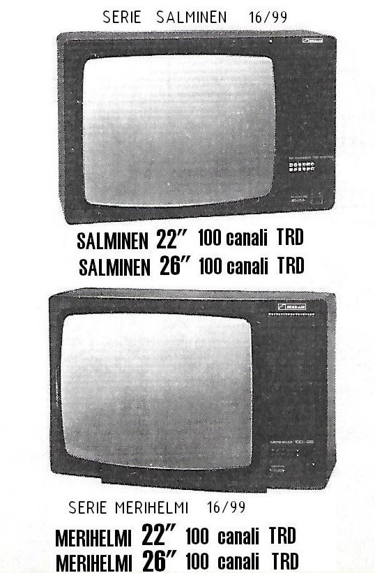 Televisori a colori prodotti dalla Mäkelä di Vigevano (PV) nel biennio 1978-79